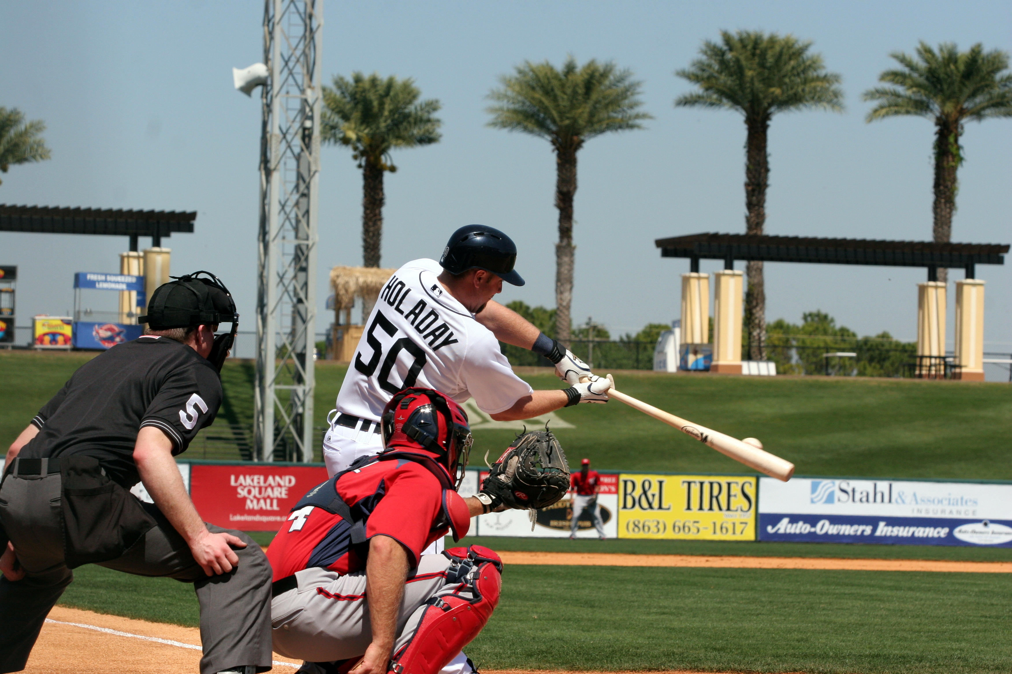 IMG_0317 Bryan Holaday